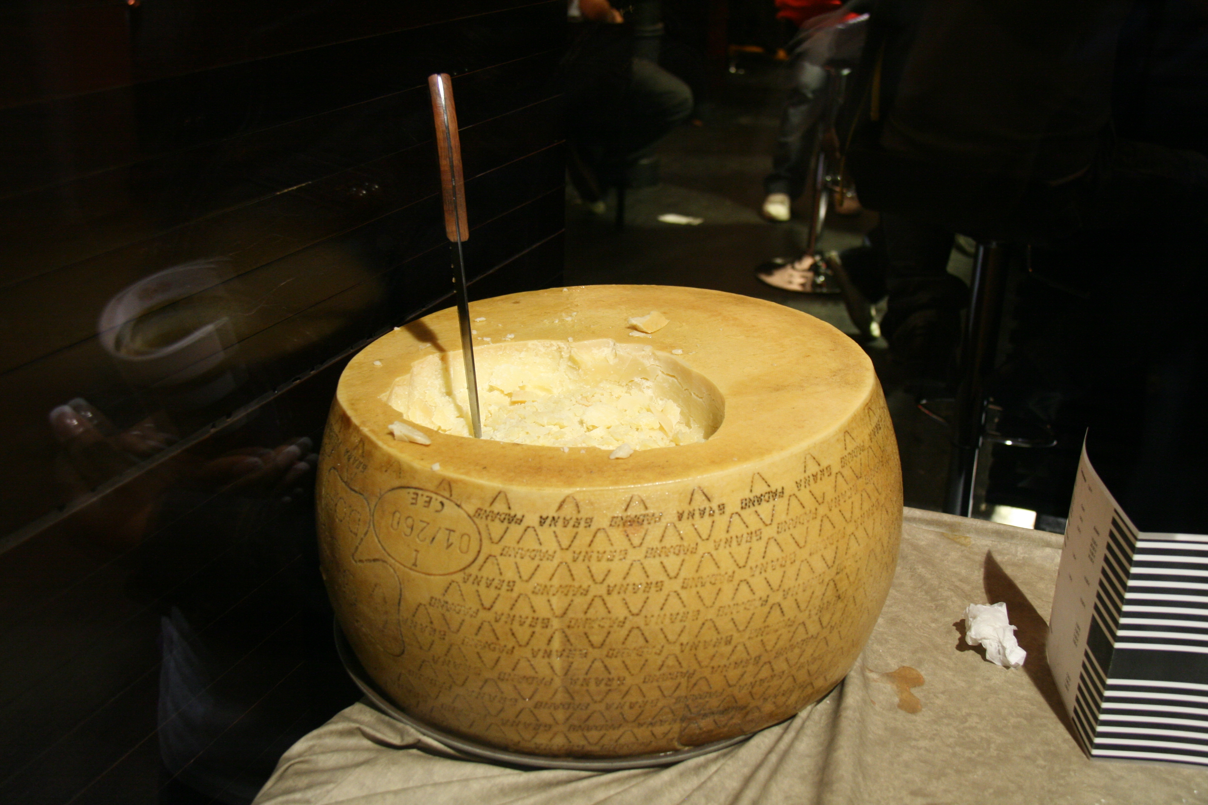 Grana Padano escavado